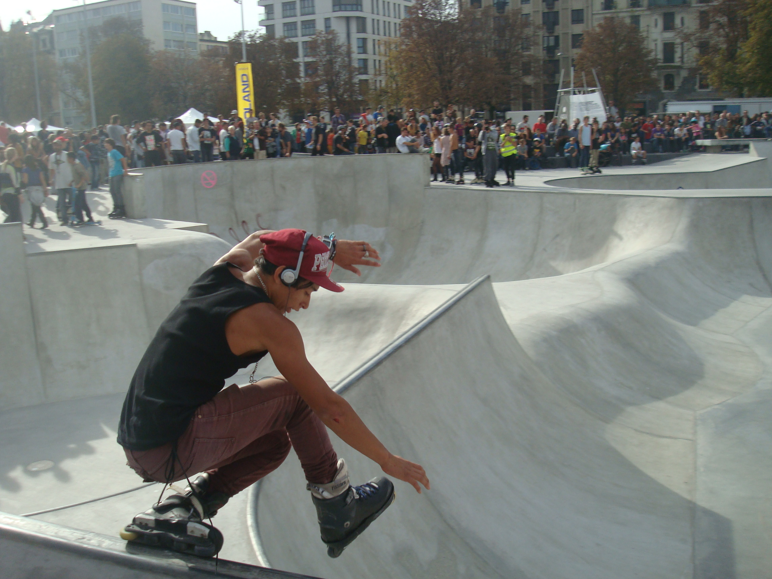 L'un des plus grand skatepark public d'Europe Inauguré le 6 octobre 2012. Contest des moins de 16 ans. Inauguration du Skatepark de Plainpalais à Genève